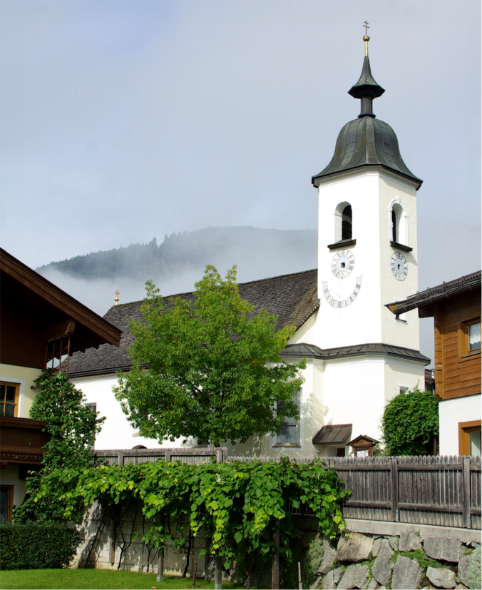 Kath. Pfarrkirche hll. Ulrich und Elisabeth in Walchen